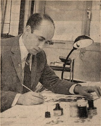 حسین عبدالله‌زاده حقیقی